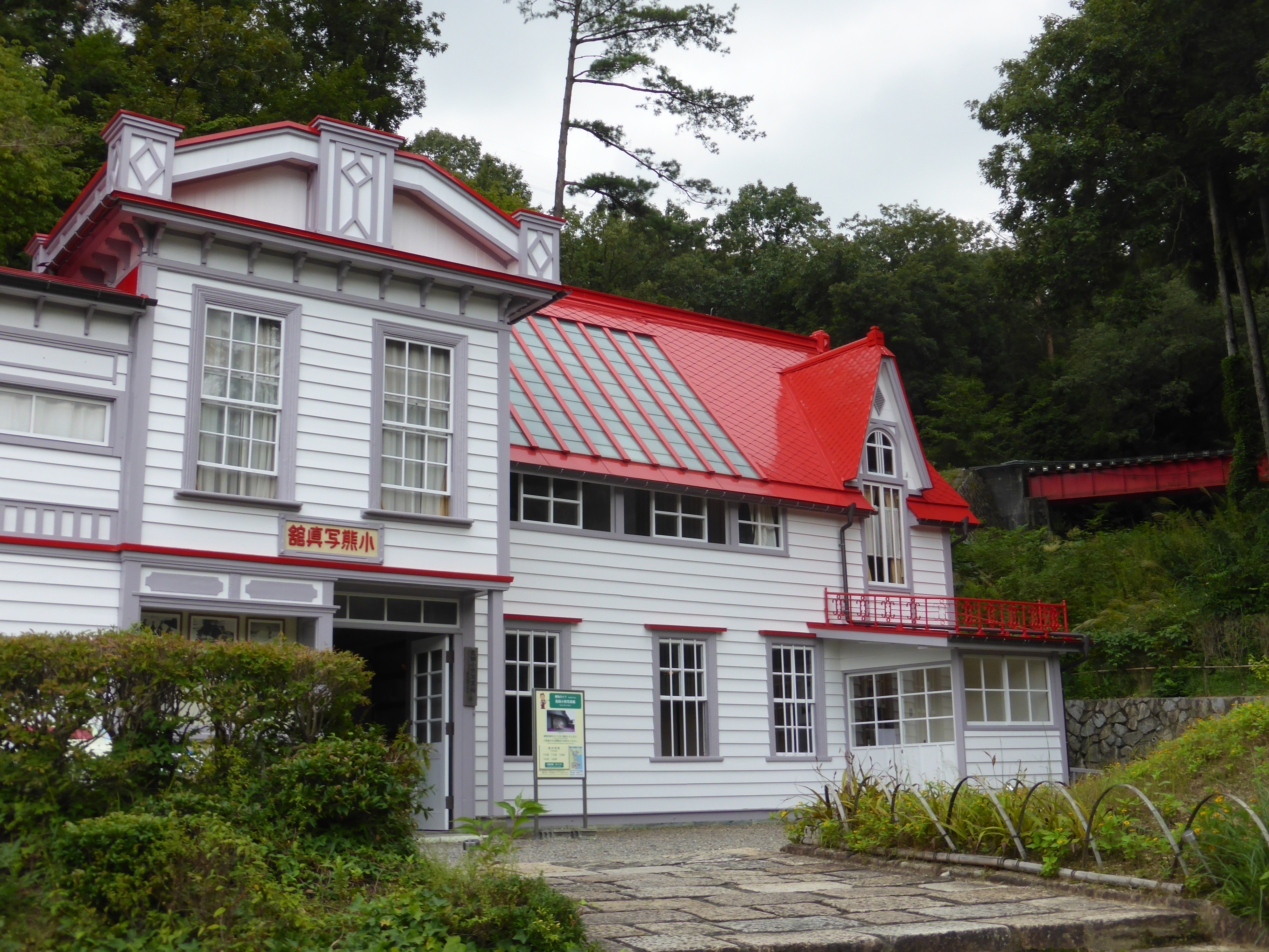 Oguma Photo Studio at Meiji-Mura